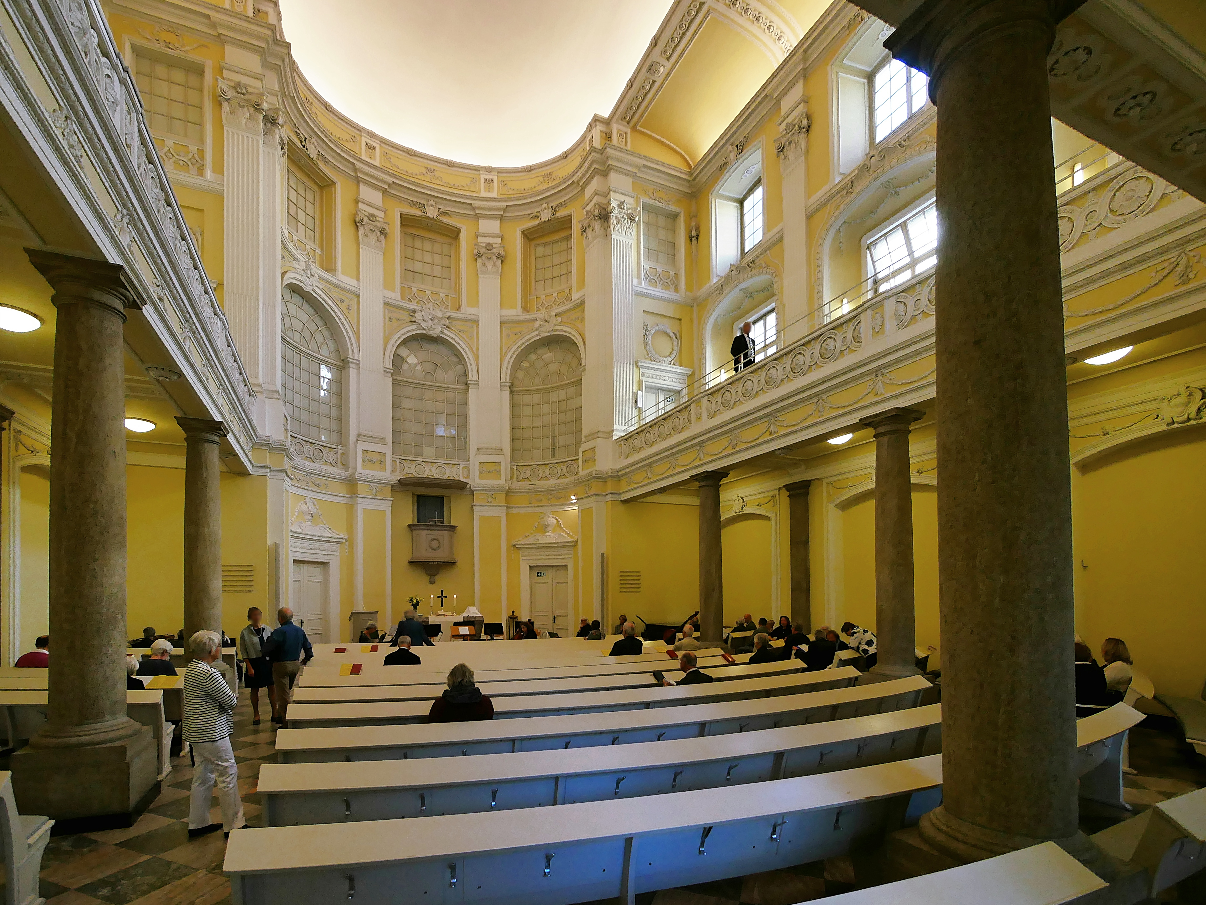 Bonn Schlosskirche, Blick durch das Kircheninnere zum Altar. Ehemals Hofkapelle der Kölner Bischöfe in ihrer Bonner Residenz. Nach dem Brand dieser im Jahr 1777 wurde sie 1779 erbaut. In der französischen Zeit 1794-1814 war sie Versammlungsraum, ab 1816 die erste evangelische Kirche Bonns und ab 1818 zugleich Kirche der im ehemaligen Schloss untergebrachten Universität. Die Schlosskirche wurde im Zweiten Weltkrieg zerstört und danach bis 1951 wieder aufgebaut